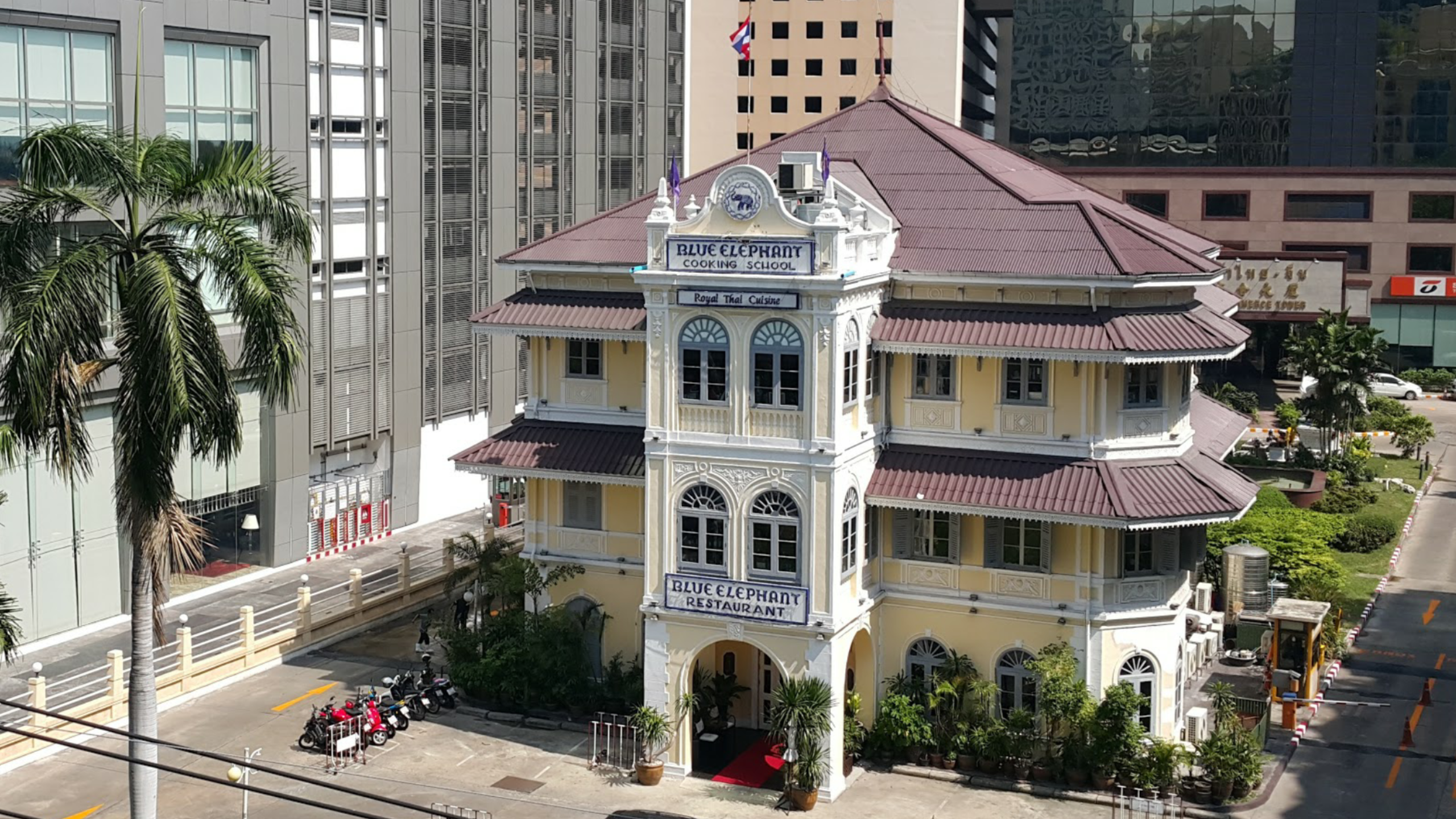 หอการค้าไทย-จีน หลังเดิม ปัจจุบันคือร้านอาหารไทยบลูเอเลเฟ่นท์